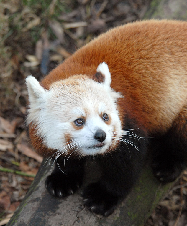 I didn't do it